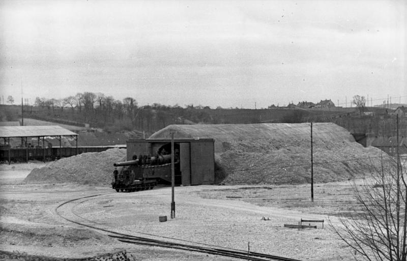 Information added by Wikimedia users.Das Bild zeigt eine Krupp 28 cm Kanone 5 (Eisenbahn) im Dombunker von Hydrequent. Aufnahmeposition verifiziert anhand einer deutschen Zeichnung des Steinbruchs mit Gleisplan von wahrscheinlich 1944. Zeichnung und Luftaufnahme desselben Zeitraums liegen dem Autor vor → GE-Overlay vorhanden.